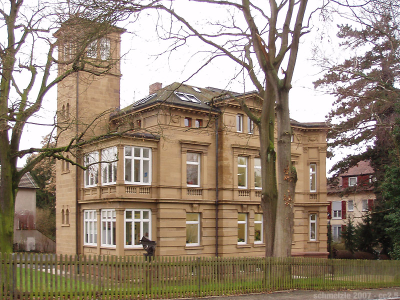 Villa Dittmarstr. 16, Heilbronn